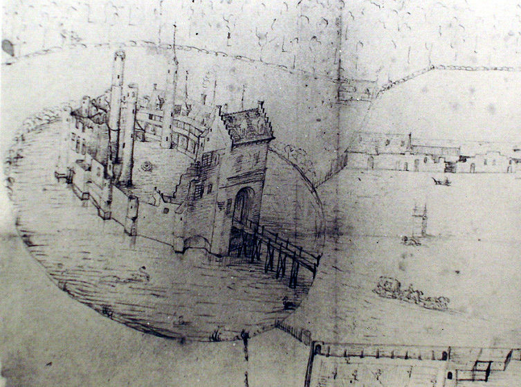 Tekening uit 1612, vroeger (wellicht foutief) toegeschreven aan Jan Bruegel de Oudere. Origineel zit in privé-verzameling. Privé-eigenaar is, ondanks opzoekingen, onbekend. Dit is een eigen foto van reproductie. Guy de gand 1 nov 2006 15:59 (CET)